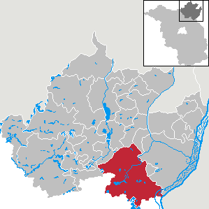 Angermünde in Brandenburg (Country) - District Uckermark